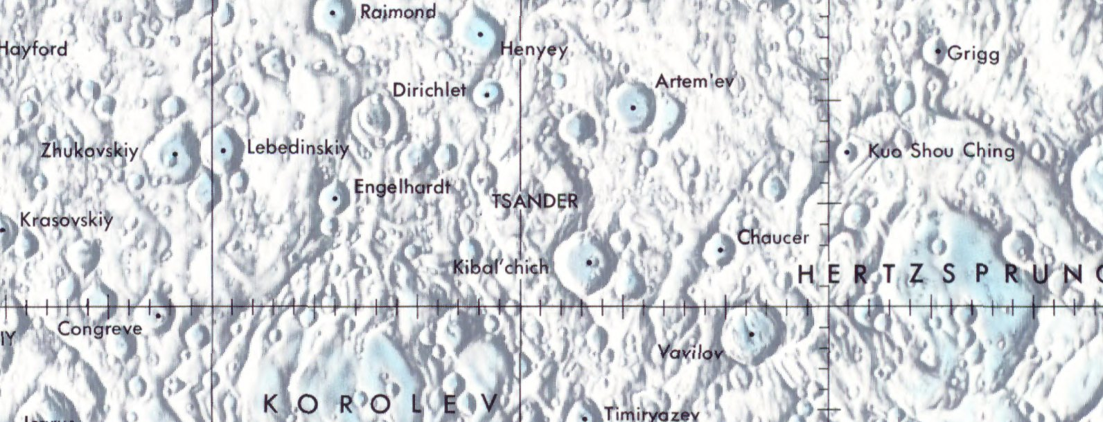 Cráter lunar Tsander. Localización. (Lunar Chart LPC1. Second Edition)